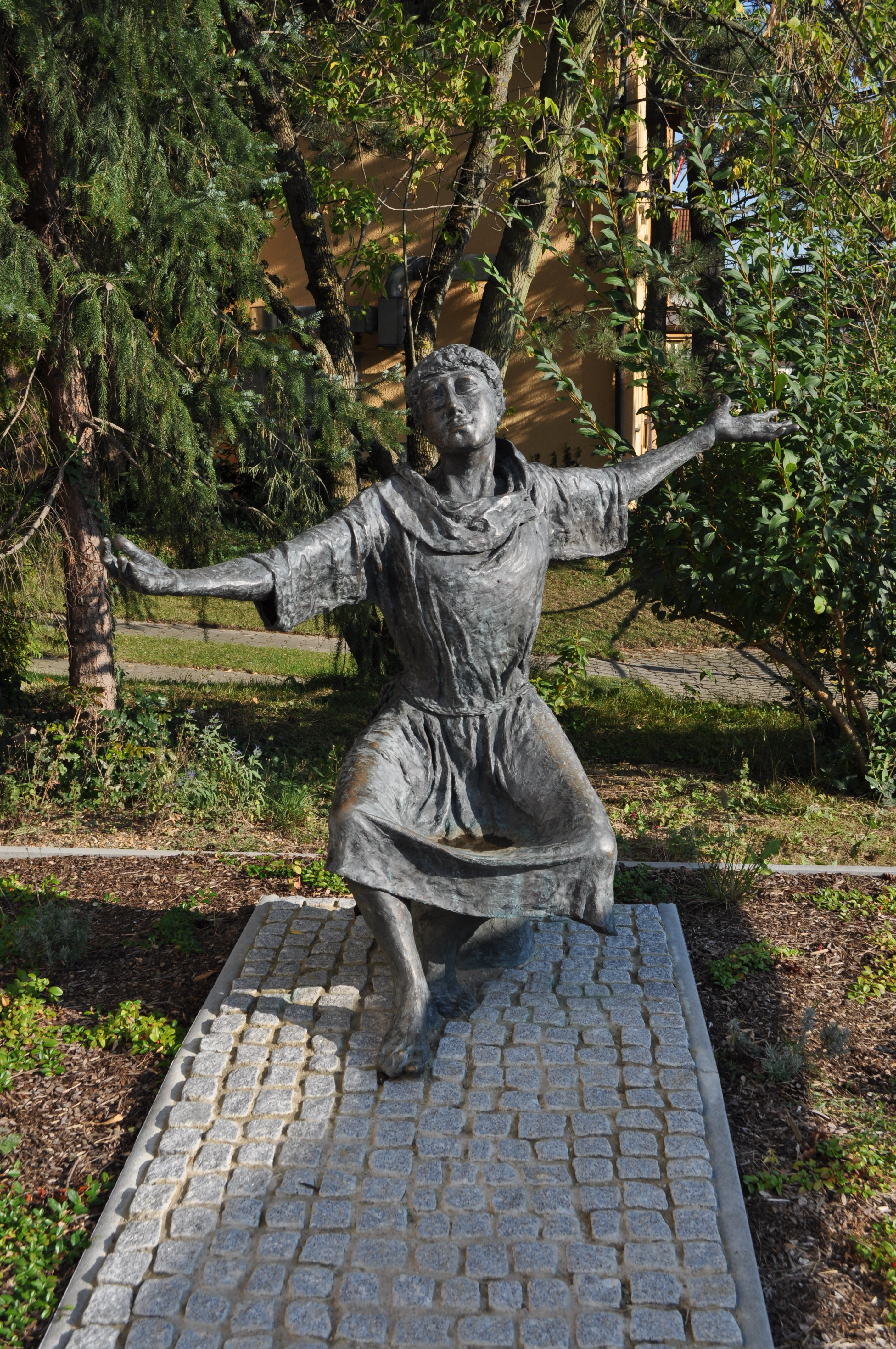 Kunstwerk "Sonnengesang des heiligen Franziskus" an der katholischen Kirche von Burgholzhausen